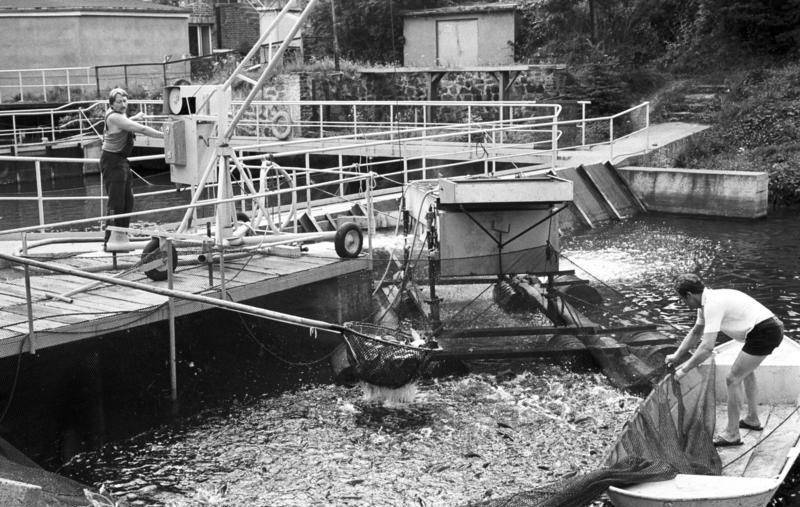 Wermsdorf, Bez. Leipzig, Forellenzucht ADN-ZB/Grubitzsch 31.7.89 Bez. Leipzig: 300.000 Forellen wachsen jährlich im Meinsberger Flutgraben heran. Das Gewässer gehört zu den etwa 220 Teichen mit einer Wasserfläche von 1.200 Hektar, die vom VEB Binnenfischerei Wermsdorf für die Fischproduktion genutzt werden. Mehrmals in der Woche wird abgesfischt und frische Ware an die Fachgeschäfte geliefert.